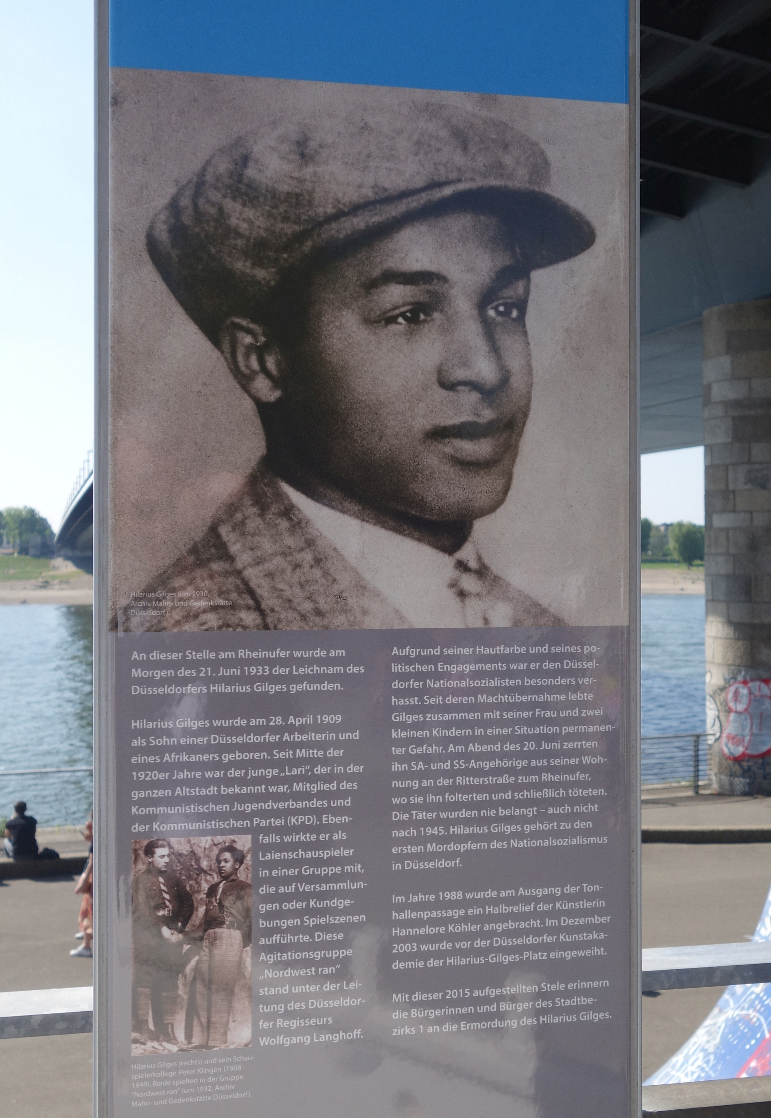 Stele Stele Hilarius Gilges, Düsseldorf, 2020.